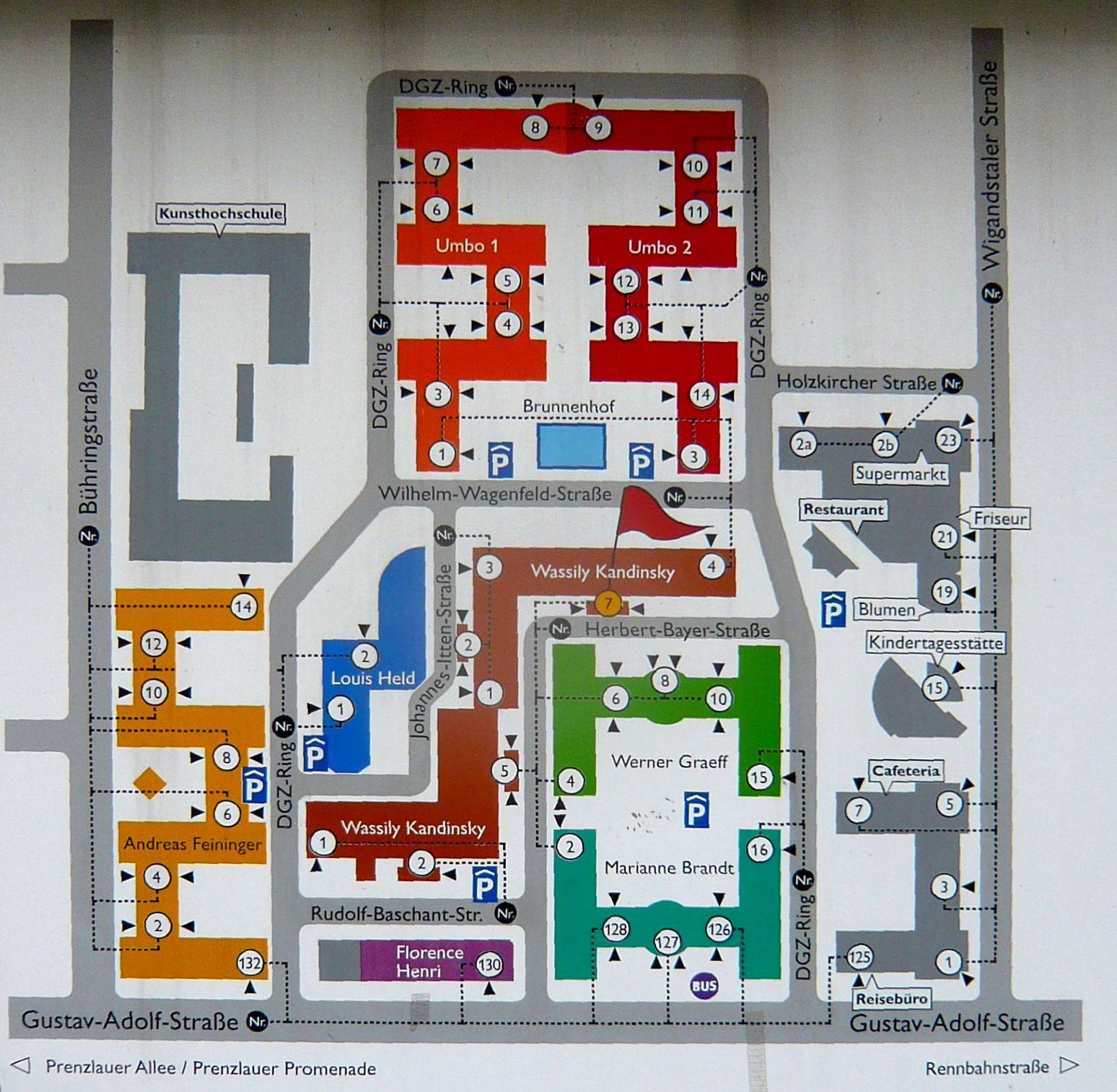 Weißensee, DGZ-Ring, Plan des Straßensystems und die Namen der Gewerbebauten.blau: Louis-Held-Haus, rot: Umbo-1-Haus, dunkelrot: Umbo-2-Haus, orange: Andreas-Feininger-Haus, dunkelbraun: Wassili-Kandinsky-Haus (Reko eines früheren Gaswerksgebäudes), braun: Wassili-Kandinsky-Haus (Neubau), grün: Werner-Graeff-Haus, türkis: Marianne-Brandt-Haus, lila: Florence-Henri-Haus; grau: namenlose FunktionsgebäudeDie Nummern sind die Hausnummern der entsprechenden Straßen.